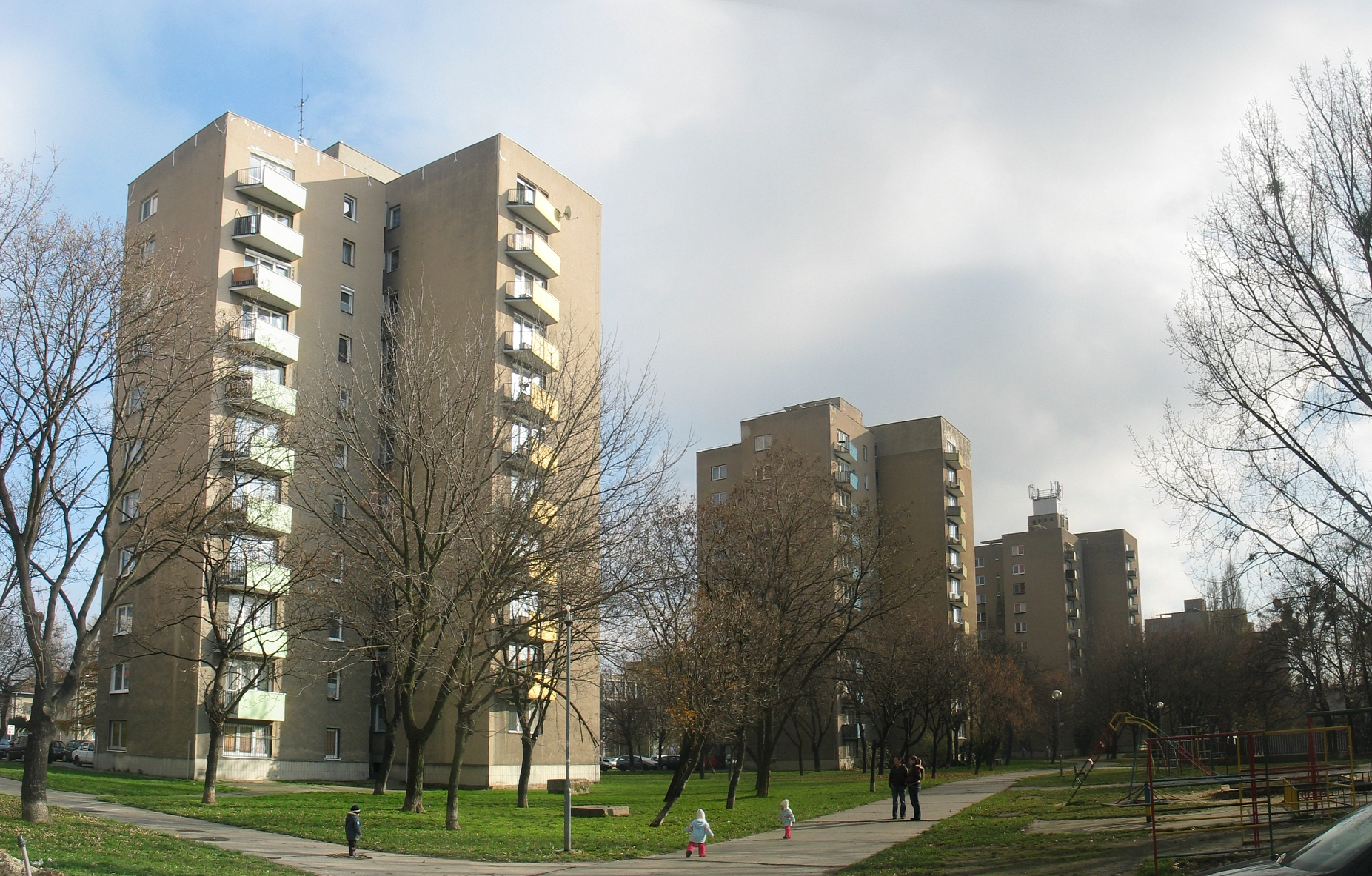 vežové domy, Paluš Karol, Bratislava Miletičova 12,14,16,20,22, 1957